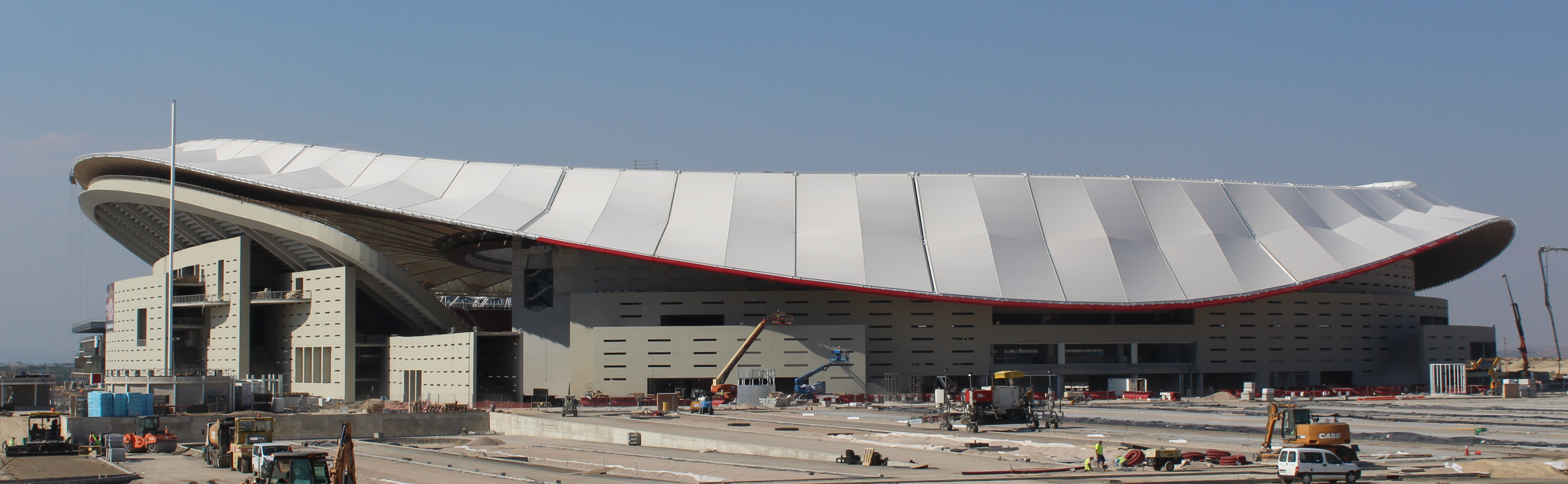 Obras del Estadio Metropolitano, Madrid